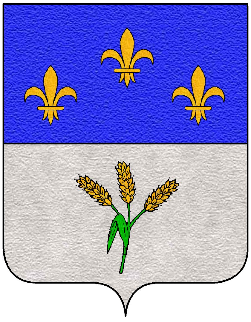 Stemma della famiglia Belgrano